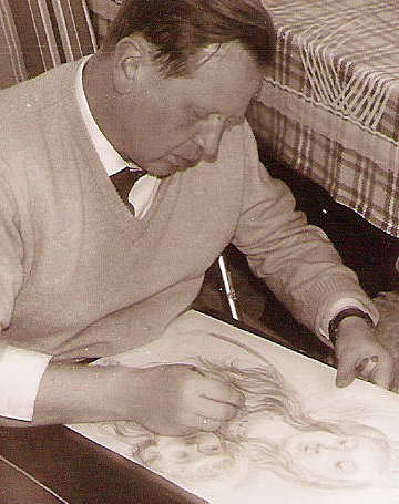 Gerhard Swoboda zeichnet die "Braunschläger Mutter Gottes" (1960)